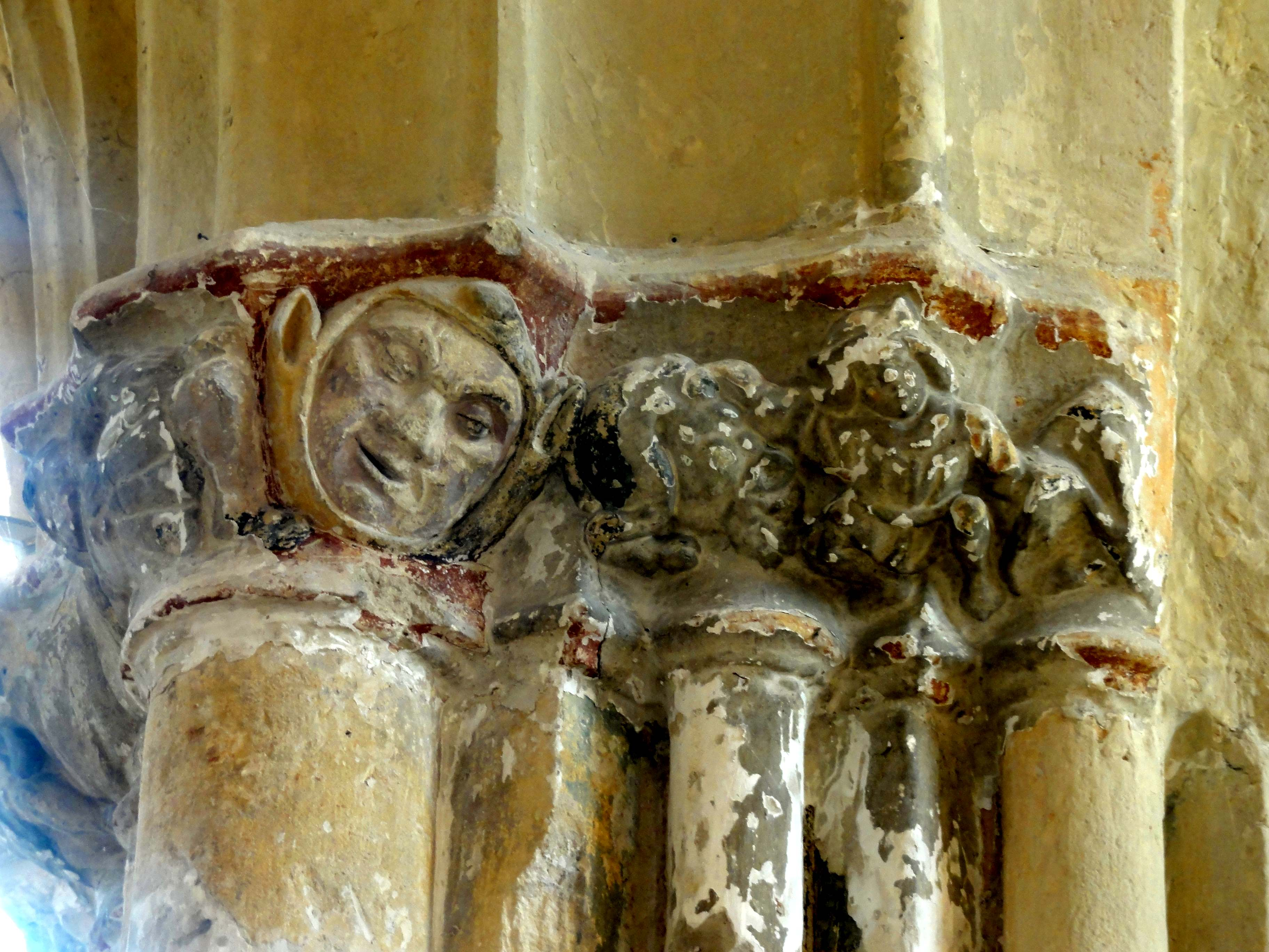 Chapiteaux de l'église - voir titre.